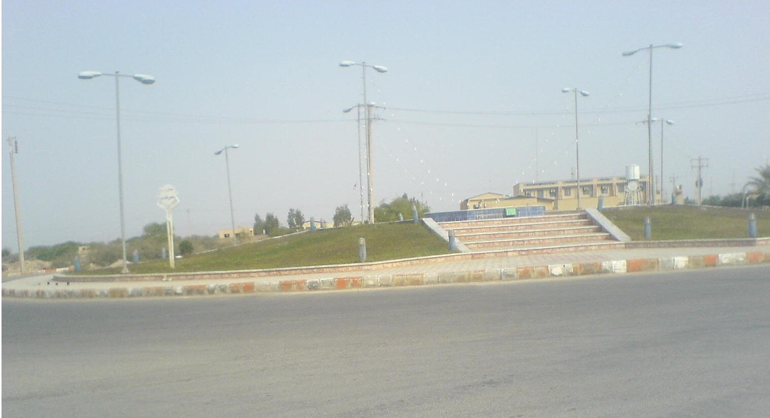 پارک ورودی جنوب شهر بردخون